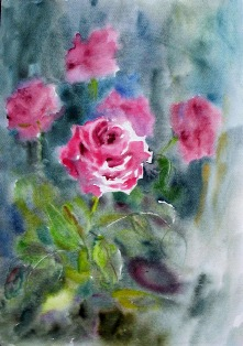 Оболонкова Юлия, "Розы на голубом", 2010